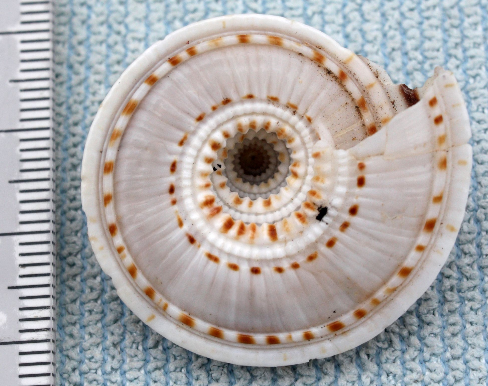 Underside av perspektivsnegl Architectonica perspectiva som har gitt sneglen sitt navn. Den åpne navle gir inntrykk av å se i midten av en vindeltrapp som fortaper seg i det fjerne.Template:Byline